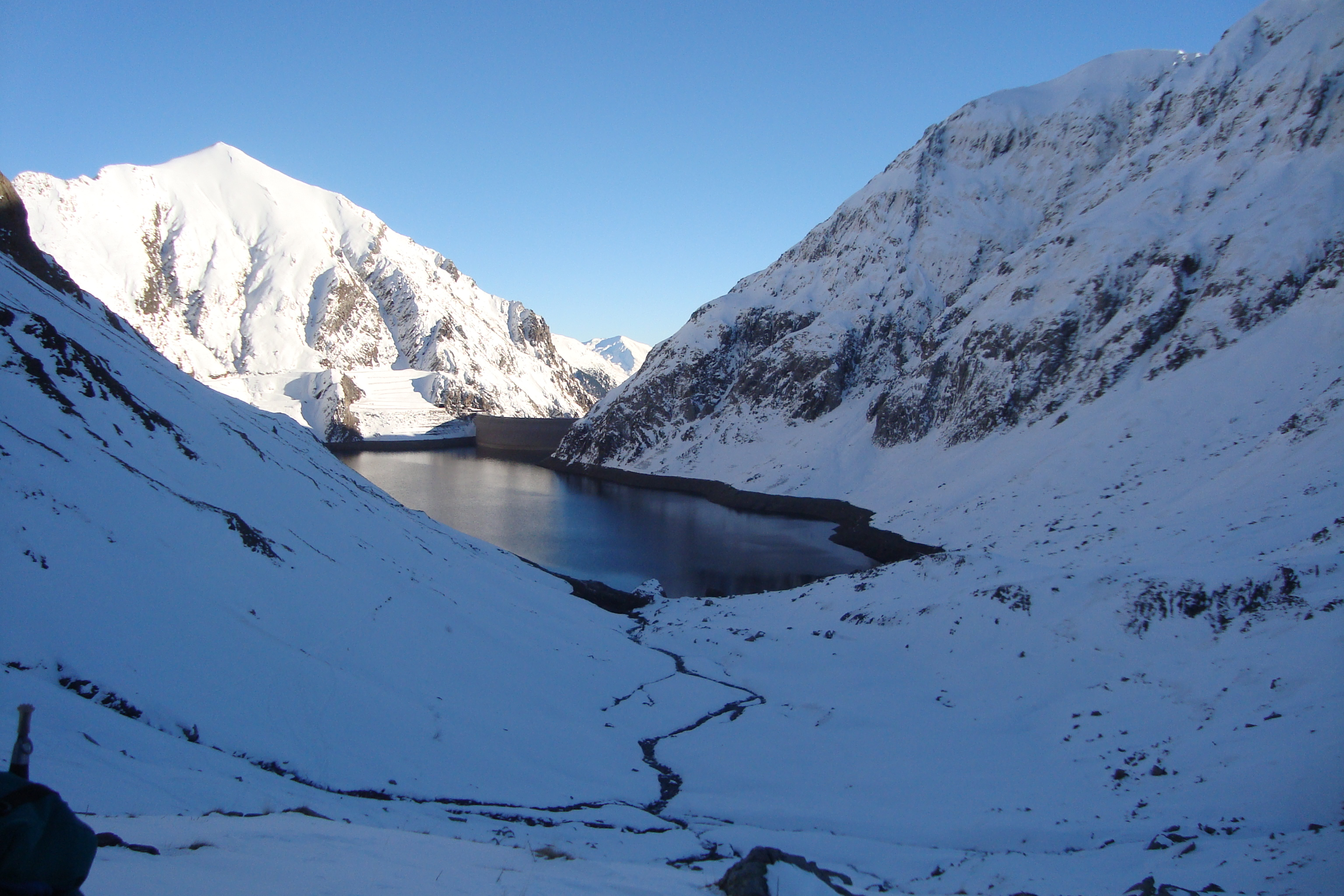 Estany de Llauset a l'hivern